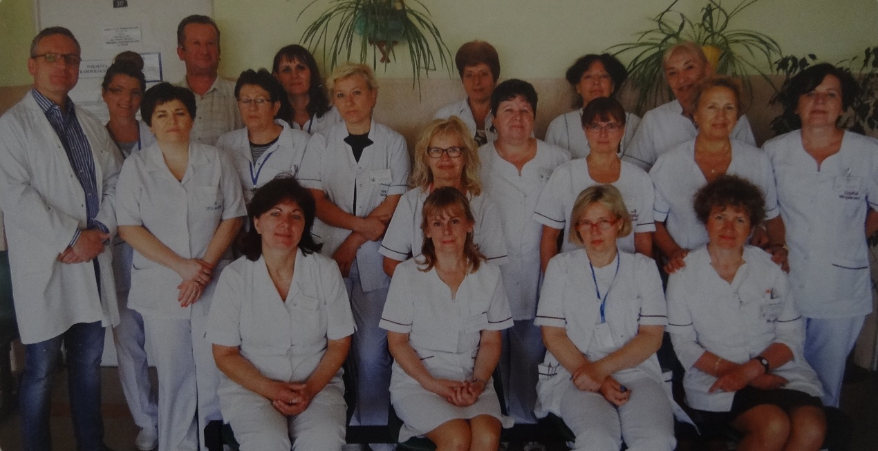 Szczecin, 2014 r. Personel Przychodni 109 Szpitala Wojskowego, od lewej kierownik przychodni ppłk lek. Arkadiusz Stefaniak